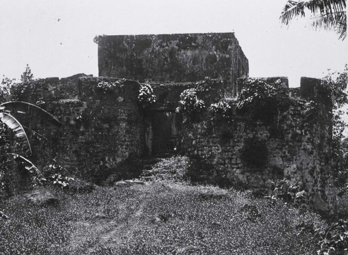 Foto. Fort Toloko te Ternate